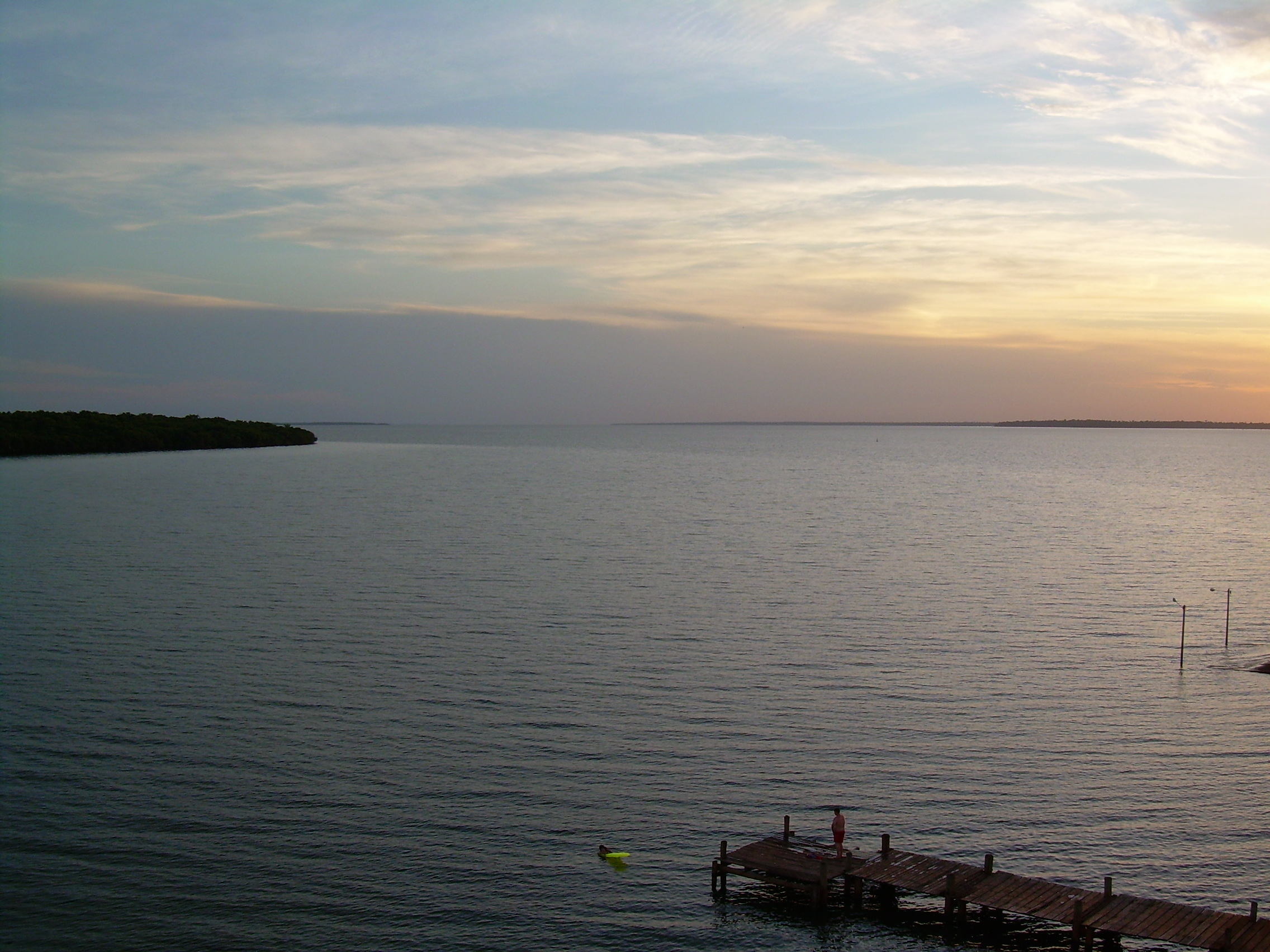 Itaipu lake